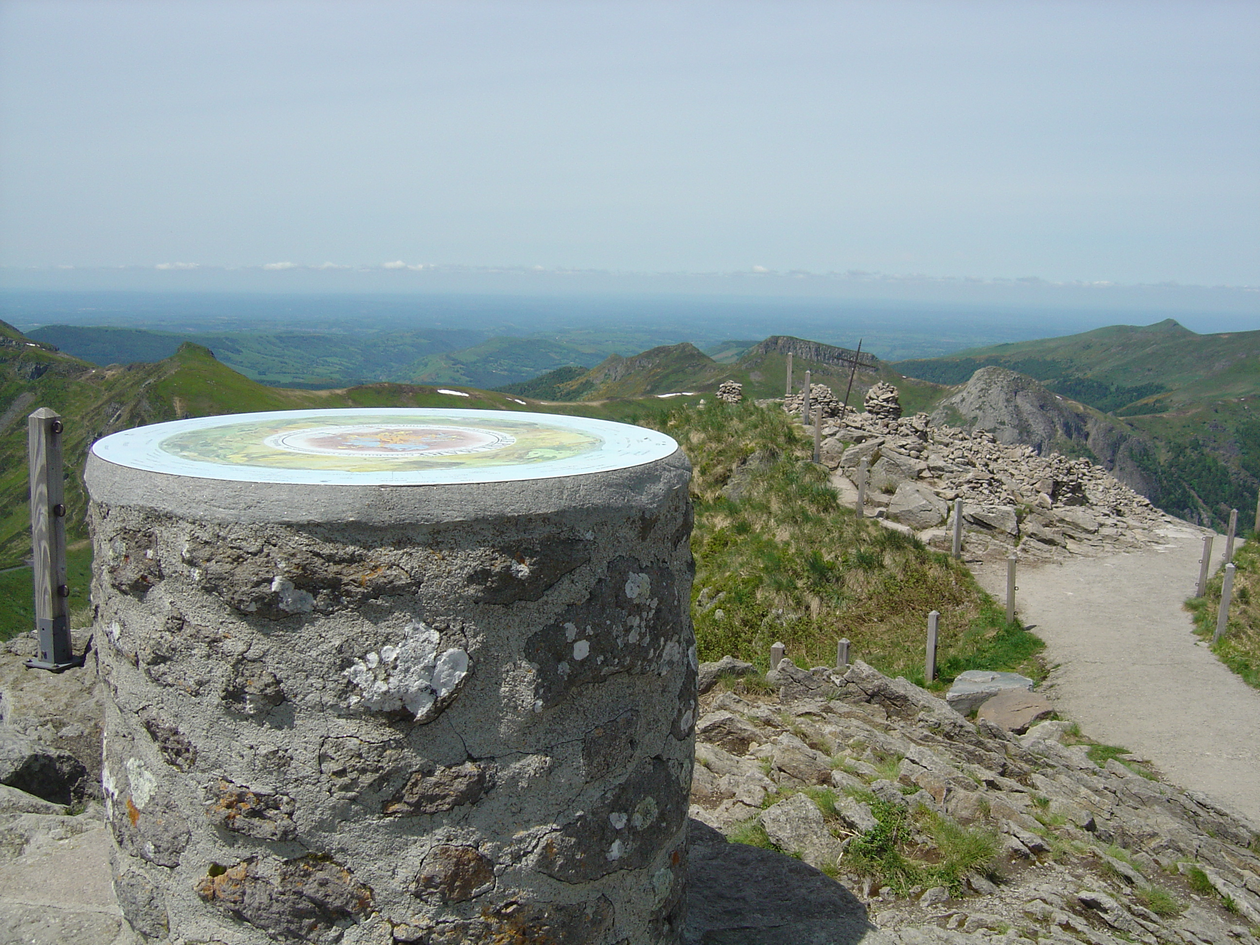 Table d'orientation du Puy Mary et croix du sommet